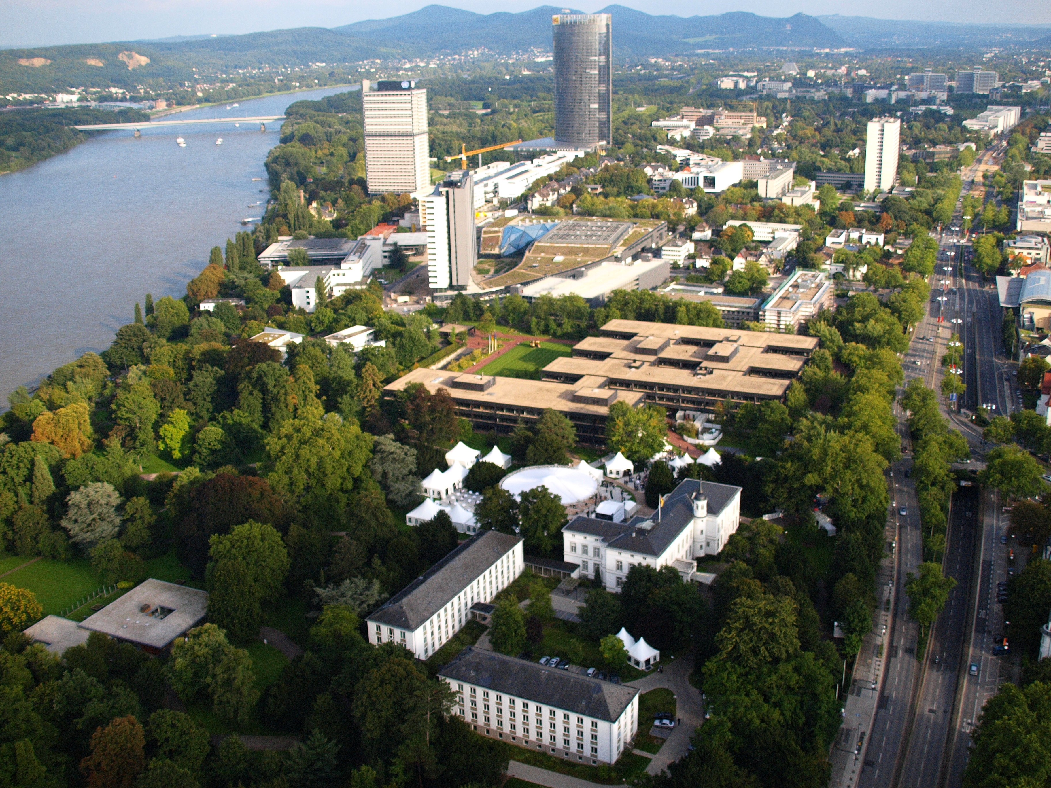 Bonner Bundesviertel: Luftaufnahme von Nordwesten